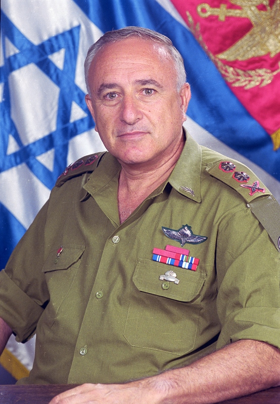 הרמטכ"ל רא"ל אמנון ליפקין-שחק.